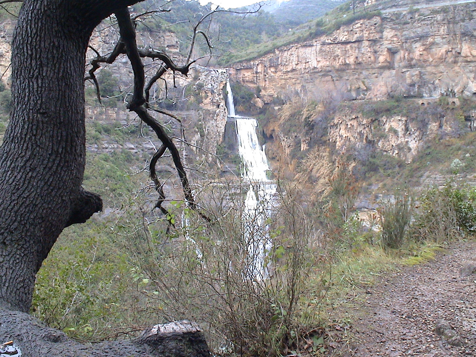 Salt d'aigua del Tenes (Riells del Fai, Bigues i Riells, Vallès Oriental)